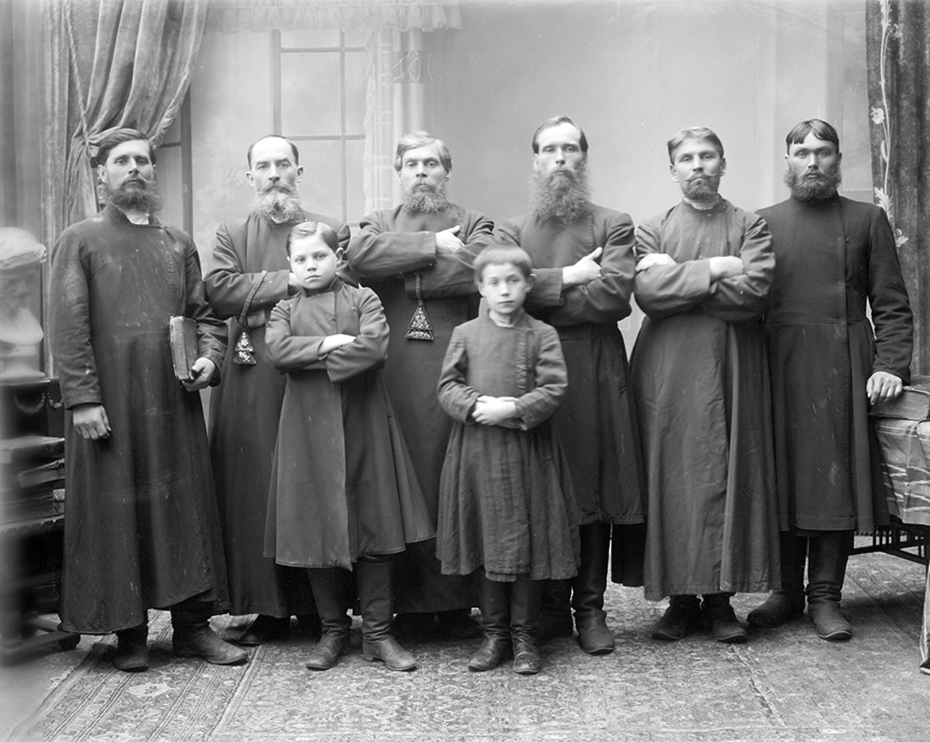 Группа старообрядцев – поморцев. без даты г. Нижний Новгород.